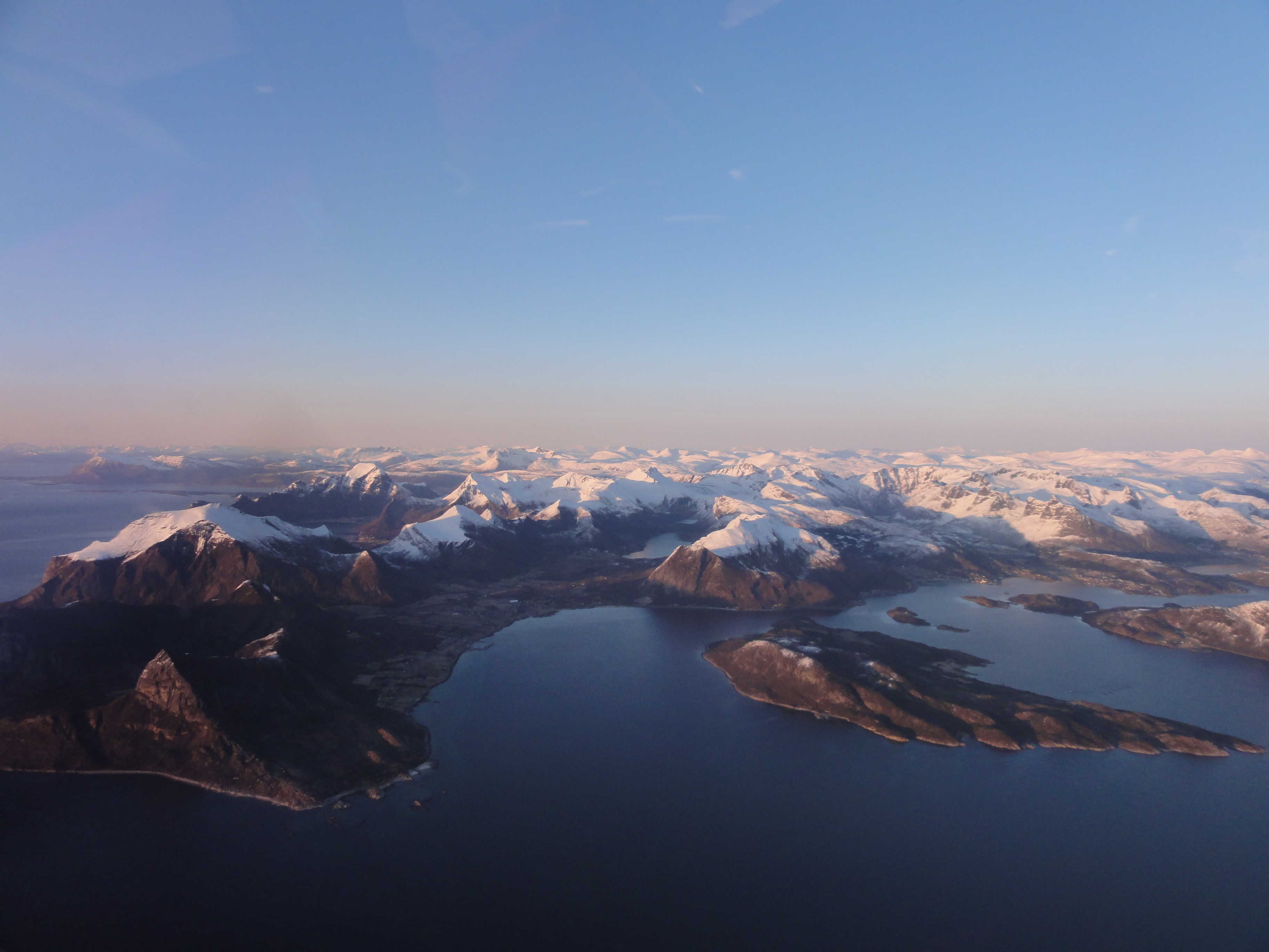 Reipå i Meløy kommune i Nordland. Ørnes sees lenger bort til høyre.